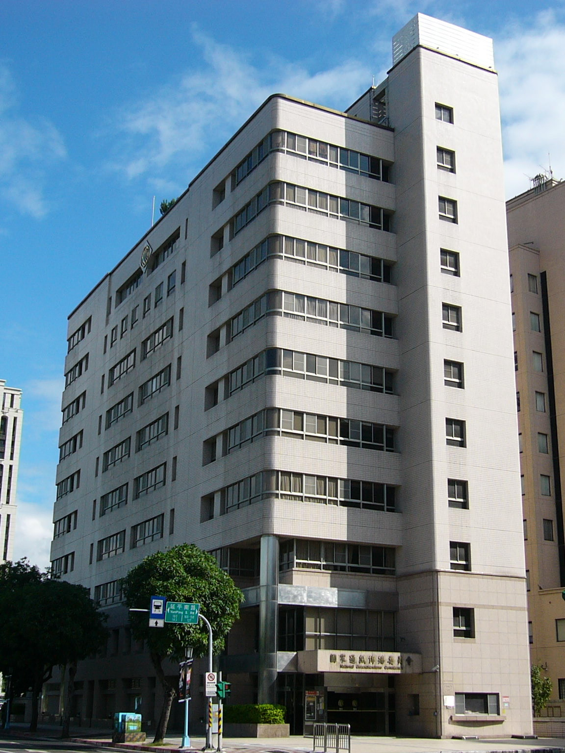 國家通訊傳播委員會臺北市延平南路辦公室（北區監理處），位於臺北市中正區延平南路143號。